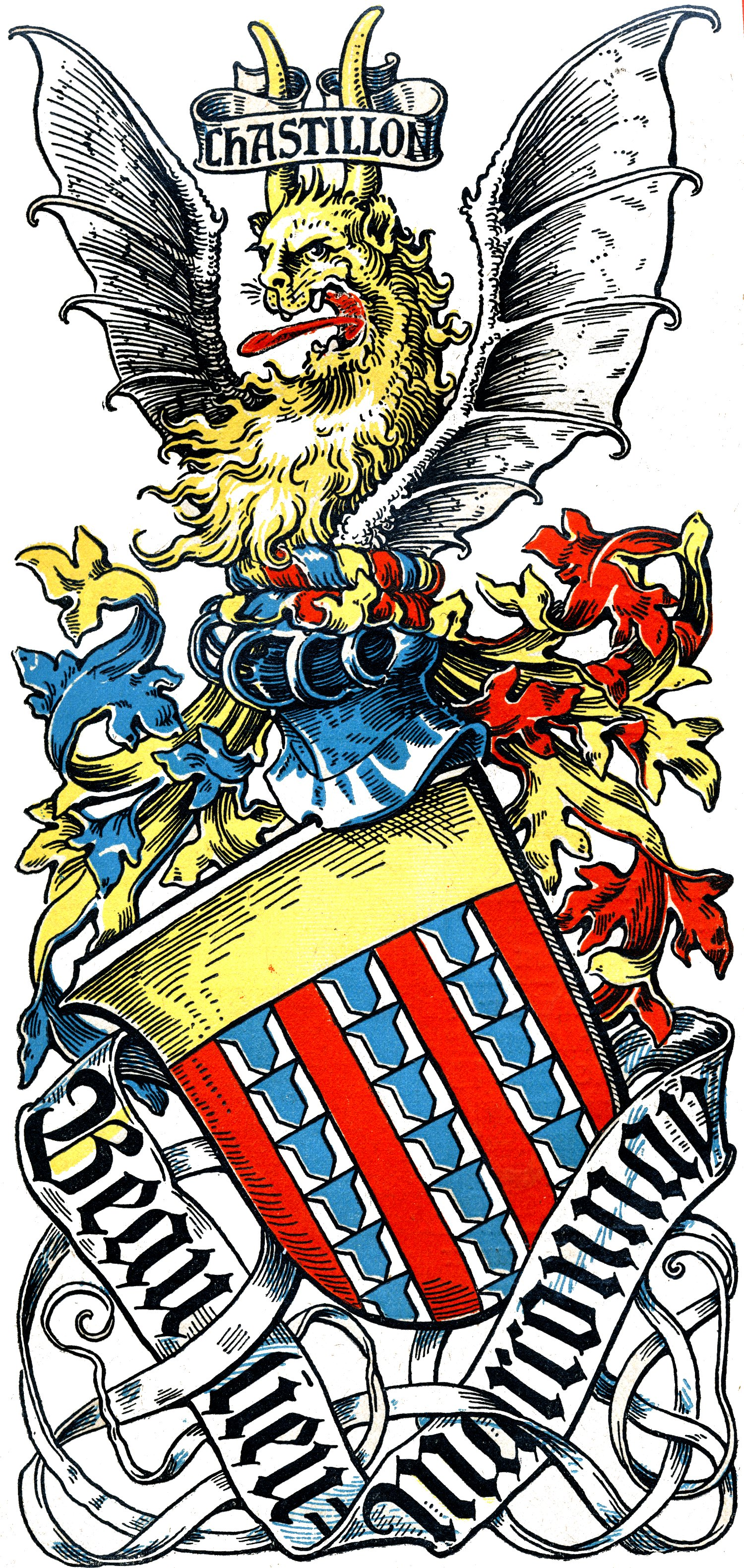 Wappen derer von Beaulieu-Marconnay